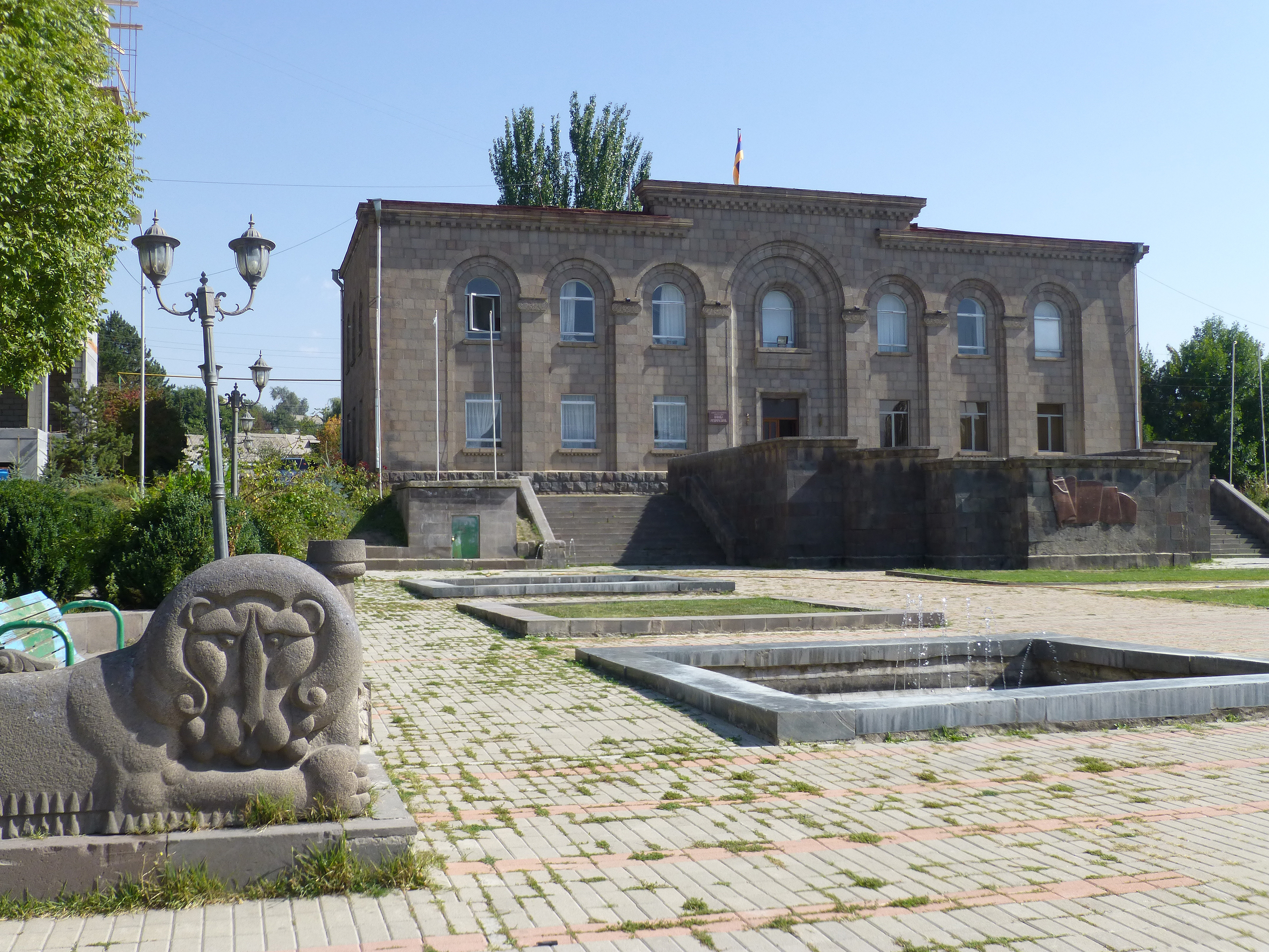 Hôtel de ville de Sissian (Arménie).